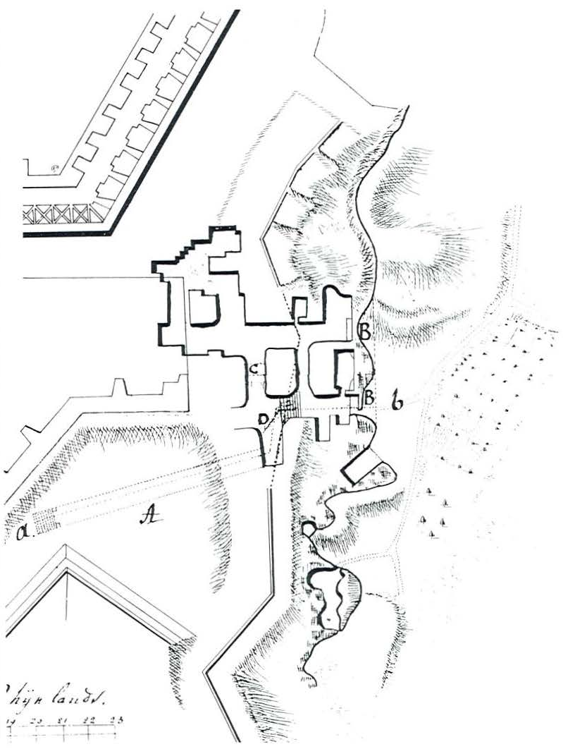 Ancienne Brasserie op historische kaart in Rijksarchief Den Haag